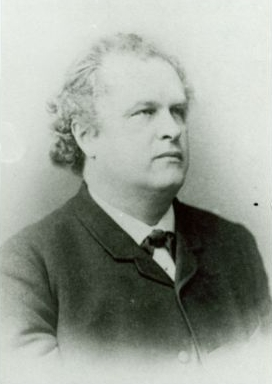 Carl Eduard Erdmann, baltisaksa õigusteadlane